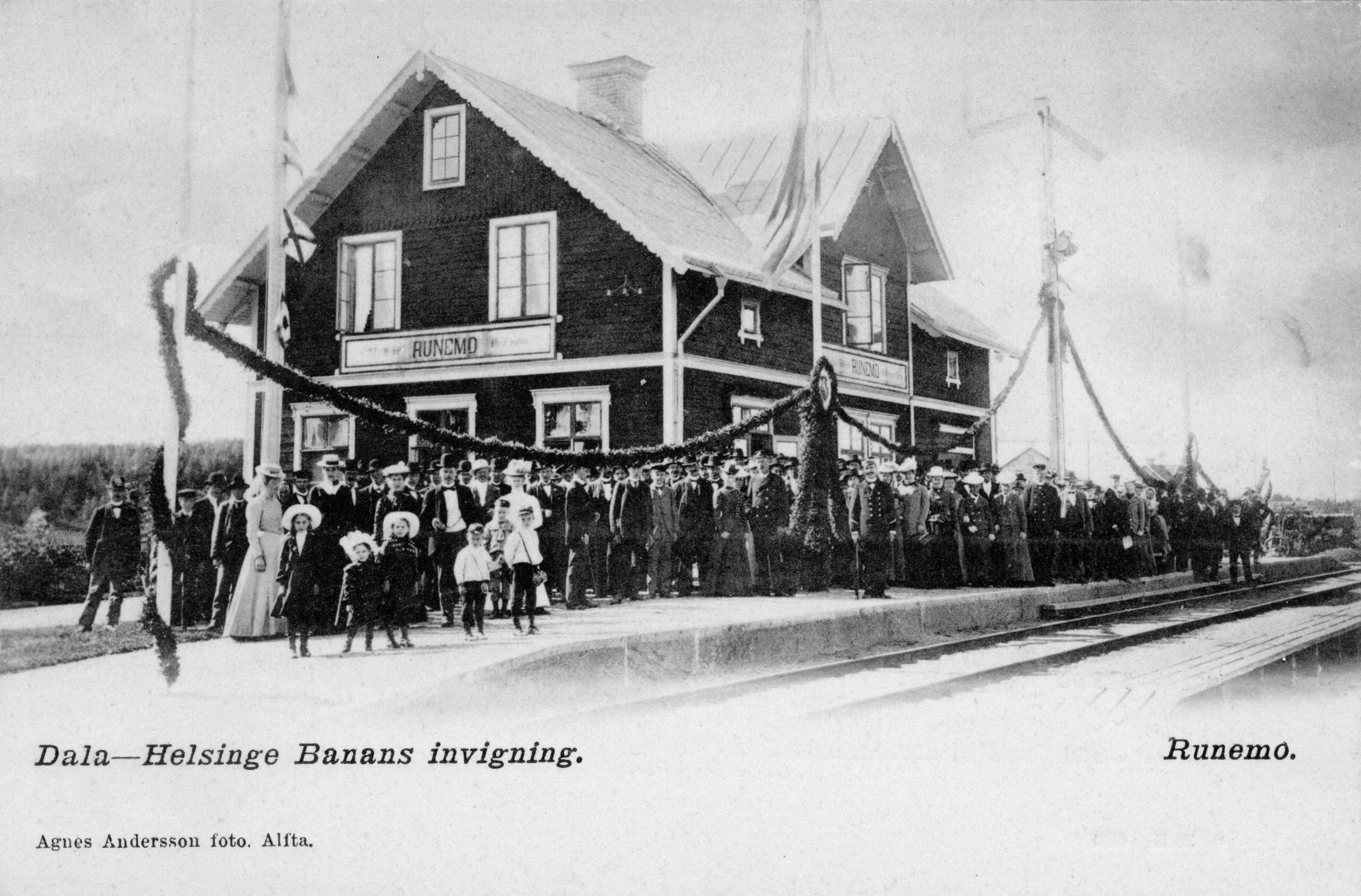 Järnvägsstation Dala-Helsinge banans Invigning. Fotografering 1900 (cirka).